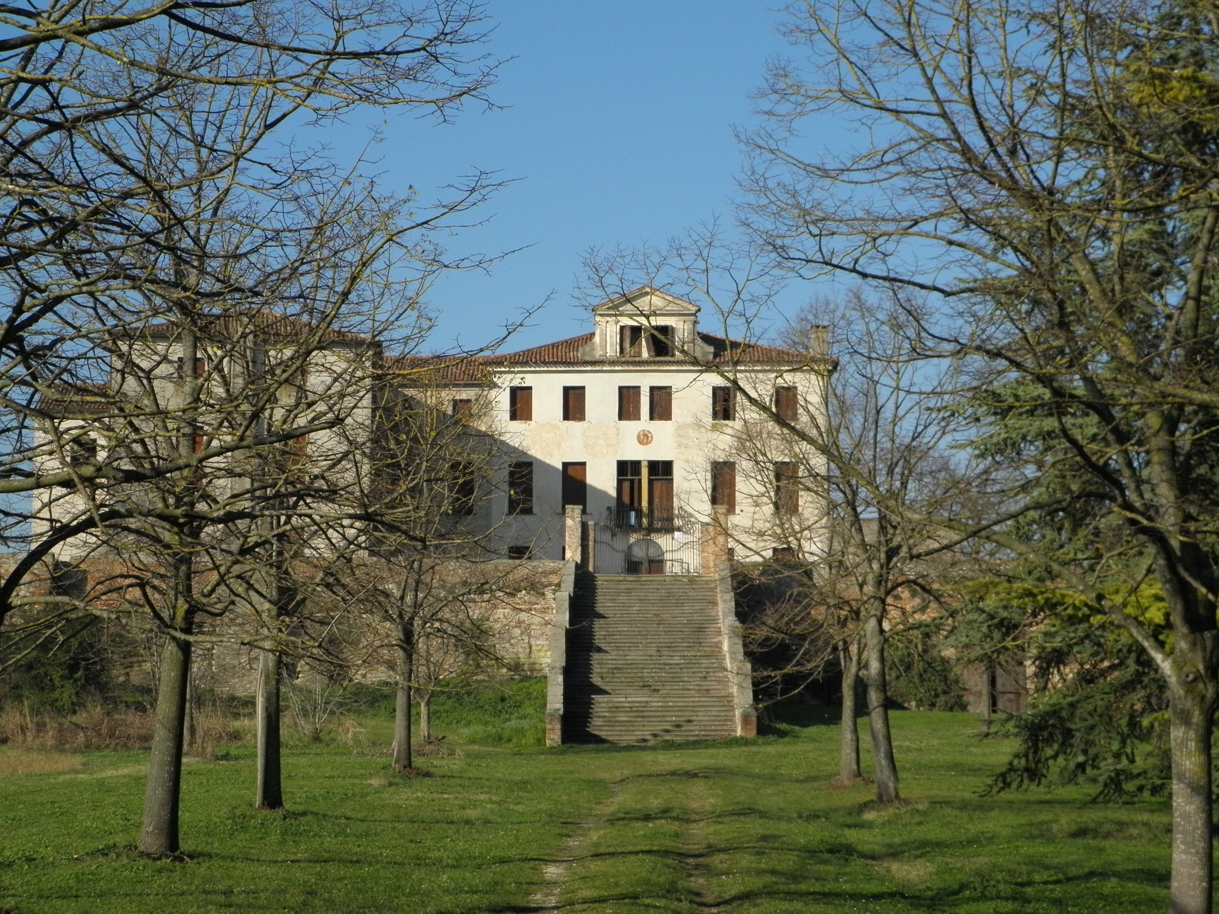 Ca' Barbaro, già Montebuso, località nel comune di Baone: Villa Ca' Barbaro, sorta sulle pendici del quasi del tutto scomparso monte Buso distrutto dall'attività estrattiva.